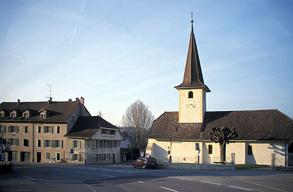 Dorfzentrum von Eclépens, Schweiz (27. März 2002)